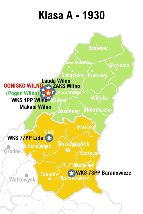 Kluby występujące w A klasie Wileńskiego OZPN w 1930r.